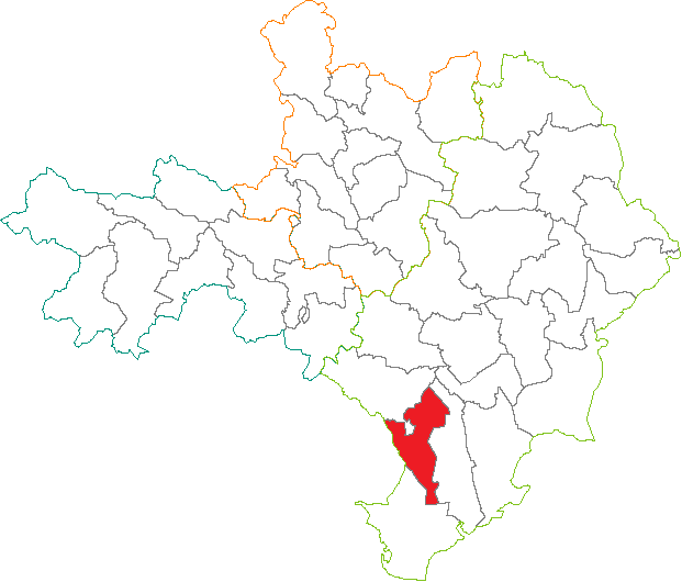 Situation du canton dans le département du Gard (France)